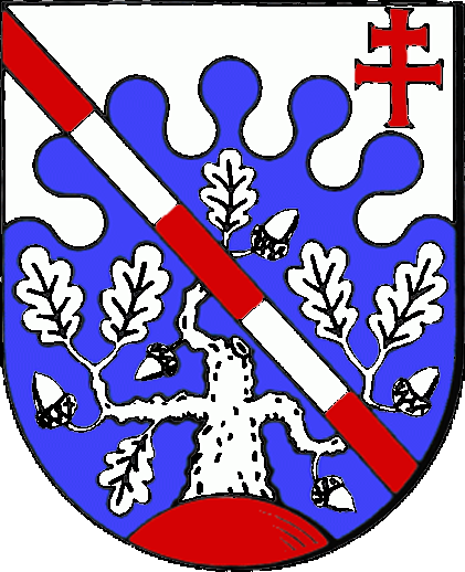 Wappen von Ronshausen